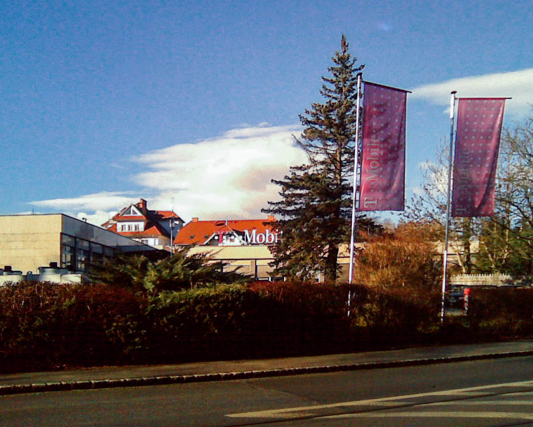 Callcenter von T-Mobile Austria in Graz-Mariagrün